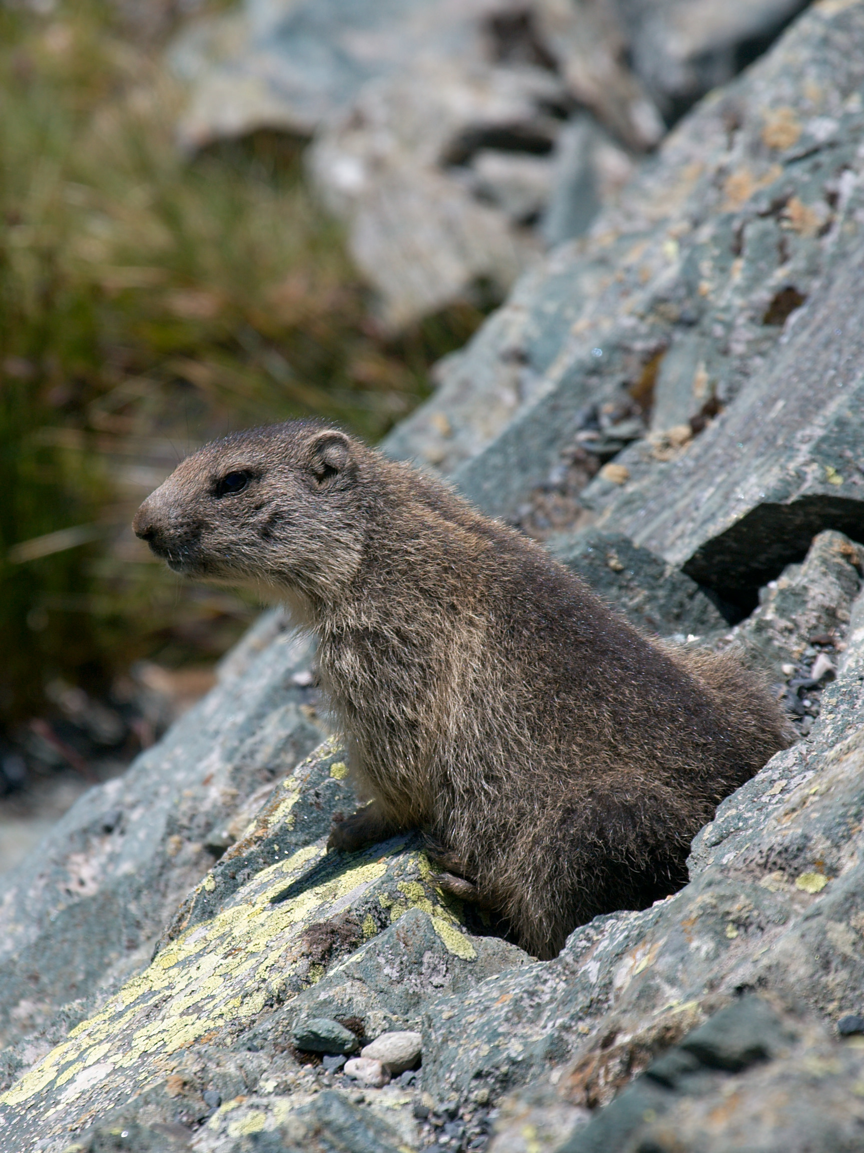 Marmota marmota at Glockner